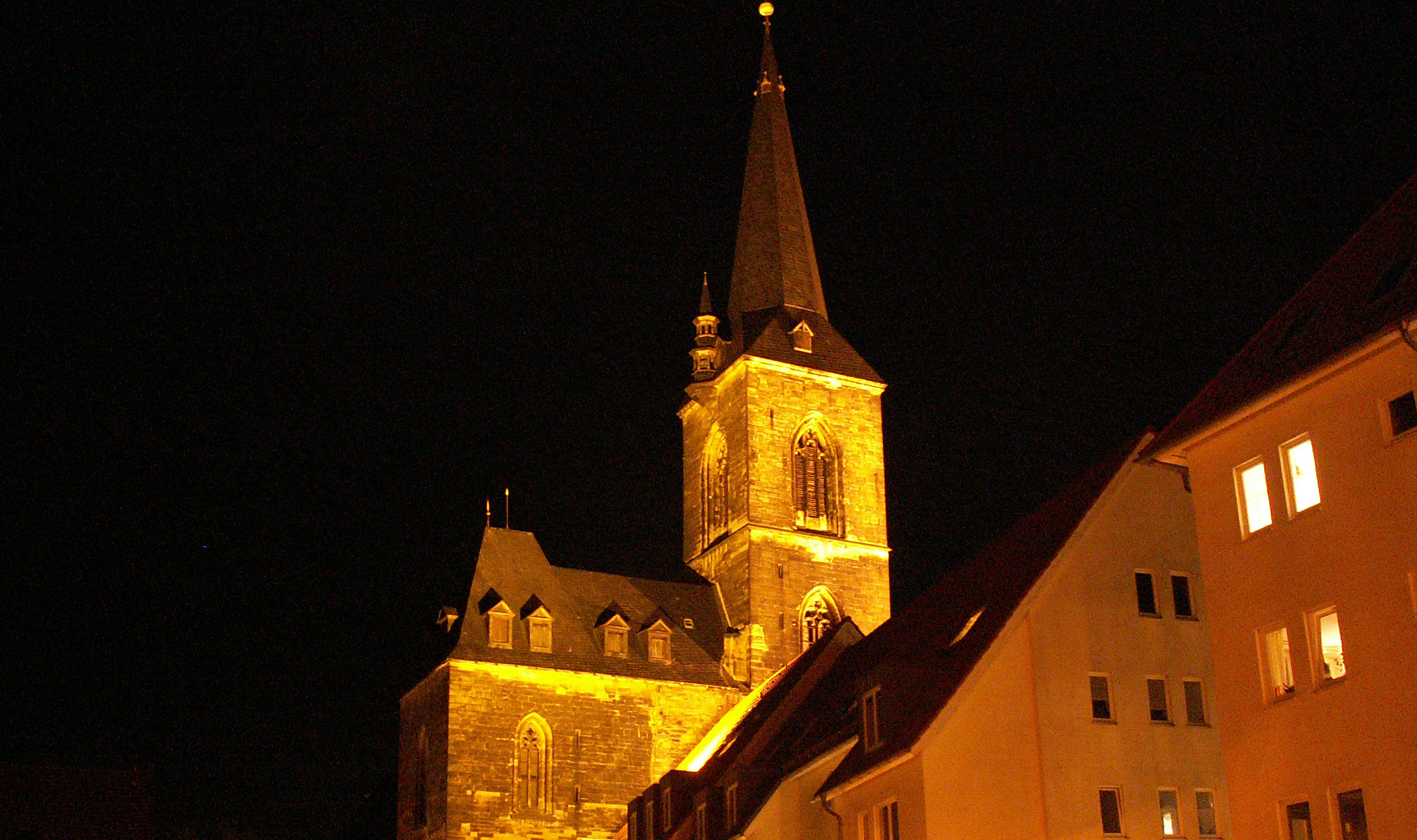 St:Stephanikirche in Aschersleben am Abend